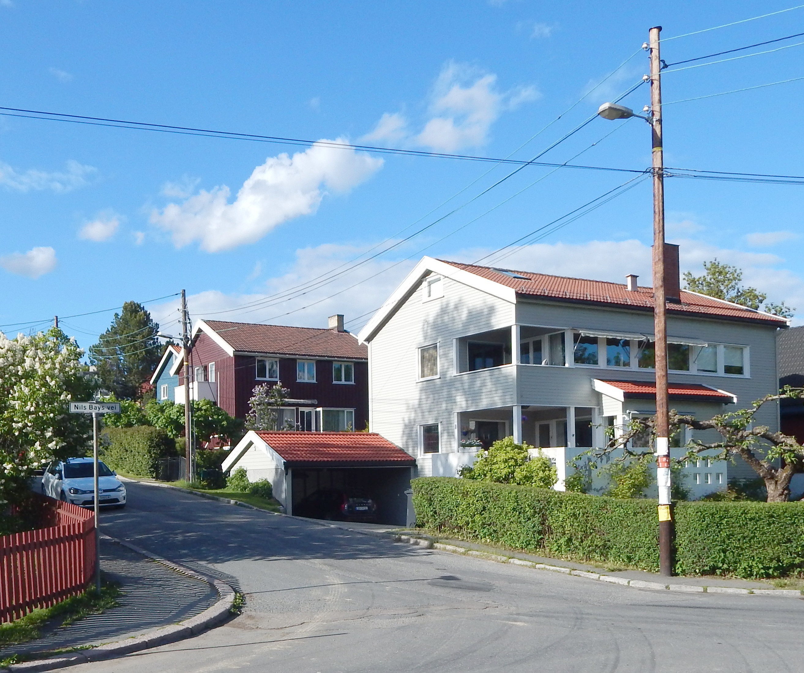 Lersolveien ved Nils Bays vei